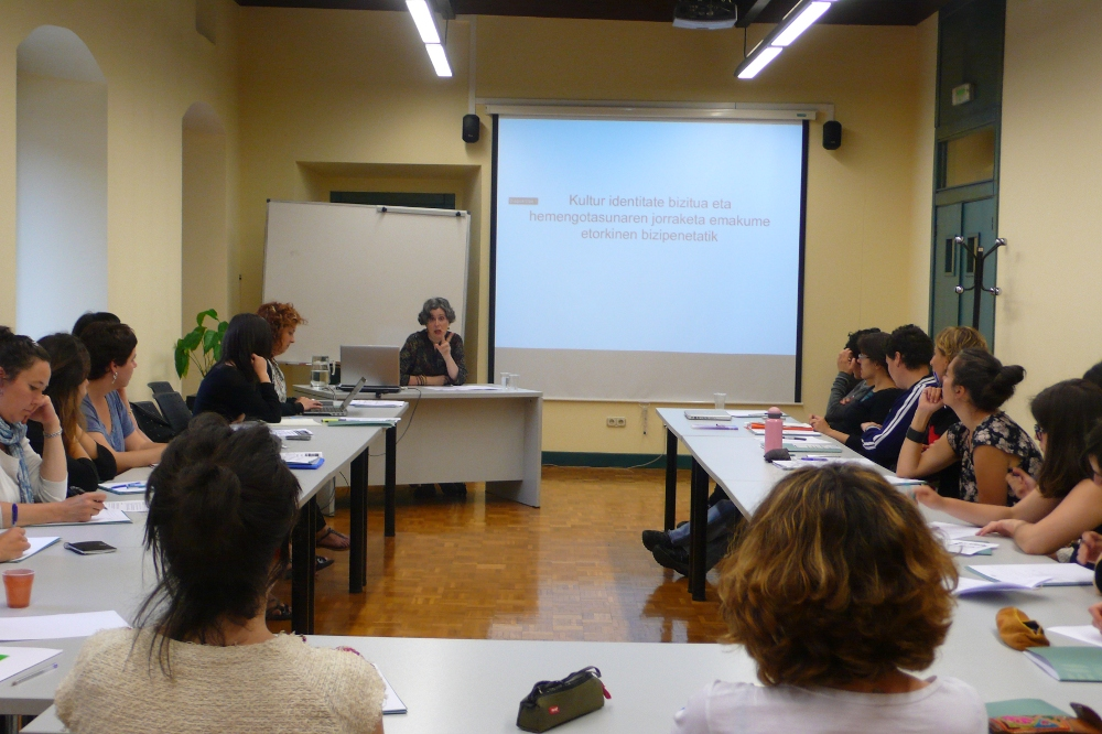 Mari Luz Esteban irakasle antropologoa ikasgelan